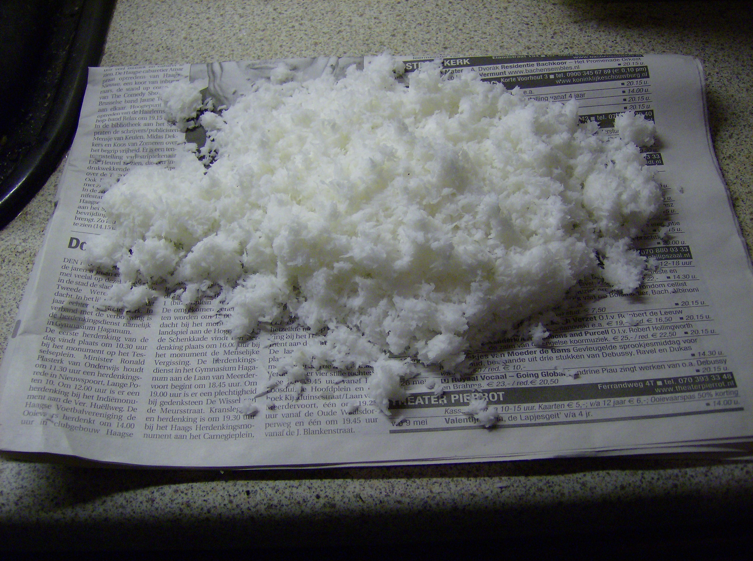 Coconut milk residue